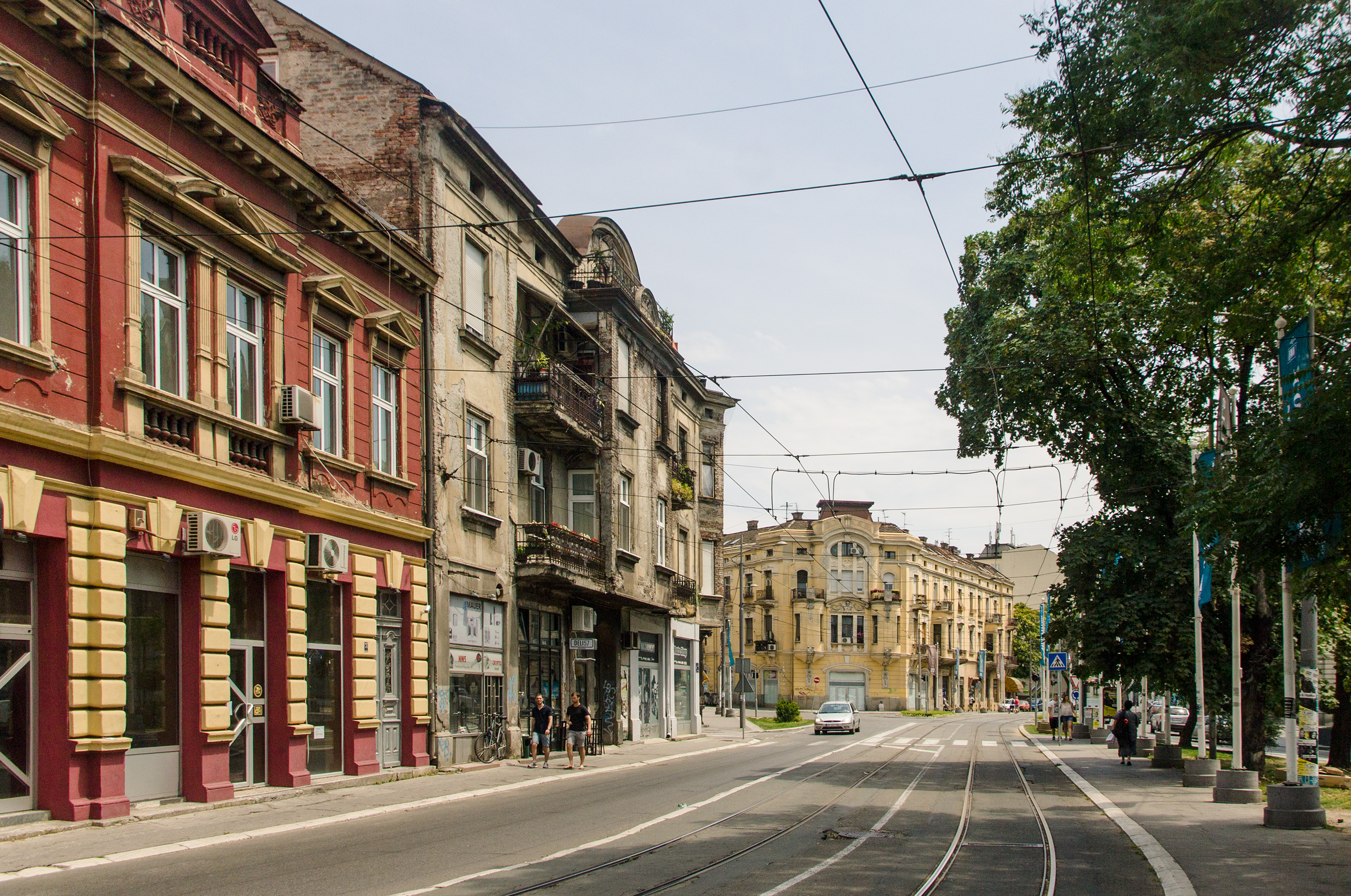 Karadjordjeva street, Belgrade